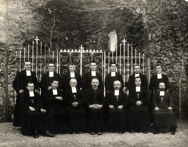 黑山扈神职人员合影，北京百望山